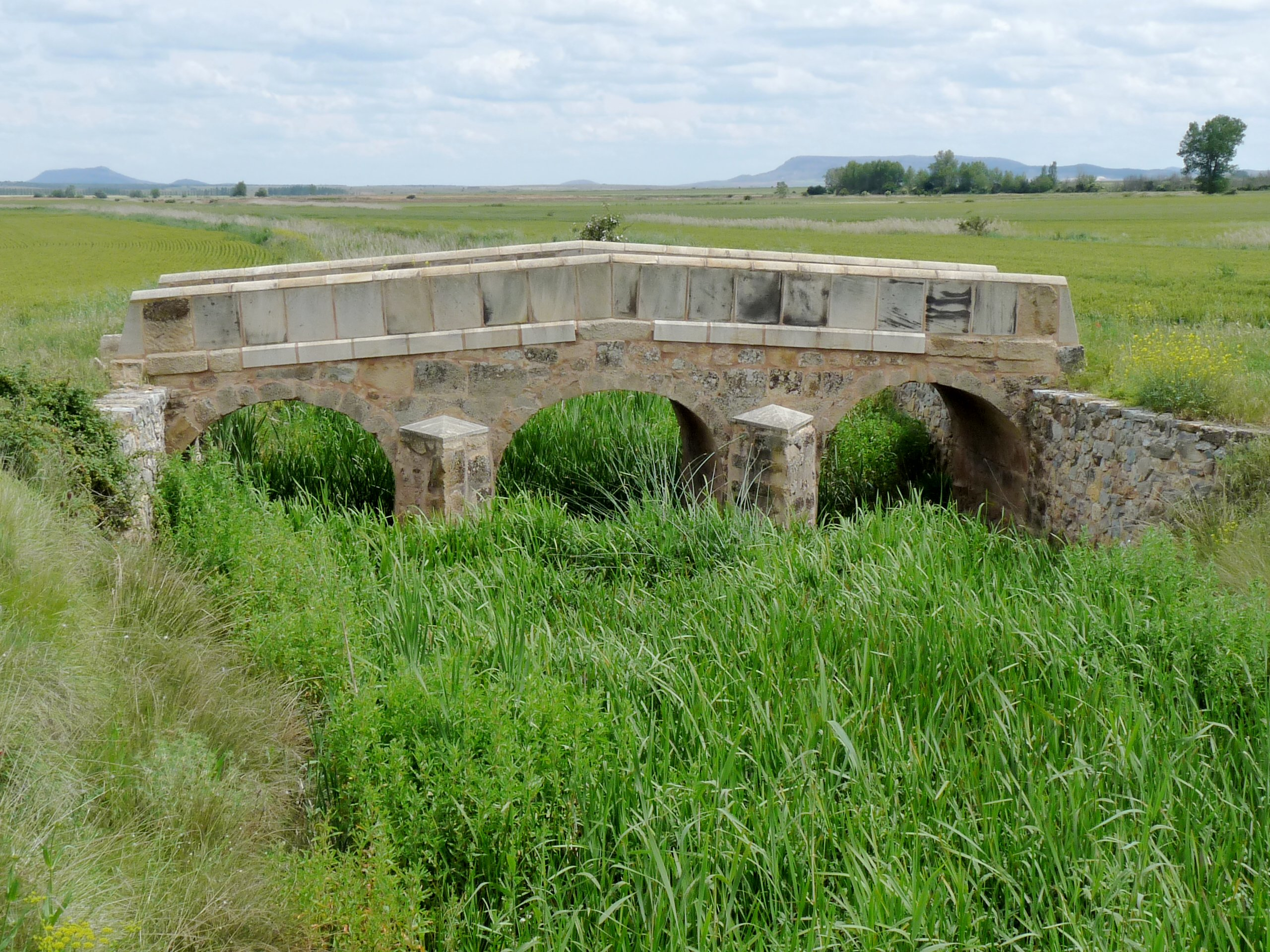 Masegoso - Puente romano en la vía de Caesaraugusta a Asturica Augusta, s. I adC